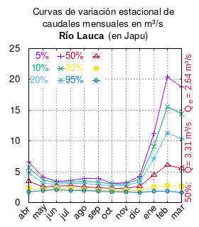 Curva de Variación Estacional del río Lauca en JAPU. # cita publicación # | apellido = Dirección General de Aguas # | nombre = # | enlace-autor = Ministerio de Obras Públicas (Chile) # | título = Diagnóstico y clasificación de los cursos y cuerpos de agua según objetivos de calidad. Cuenca Río Lauca # | ubicación = Santiago de Chile # | editorial = Ministerio de Obras Públicas (Chile) # | año = 2004 # | edición = # | url = # | urlarchivo = # | fechaarchivo = # | ref = harv # Tabla 4.3 (m3/s) pág. 32 mes 5% 10% 20% 50% 85% 95% abr 6.546 5.695 4.808 3.468 2.277 1.737 may 4.186 3.635 3.133 2.519 2.129 2.004 jun 3.402 3.223 3.018 2.662 2.280 2.082 jul 3.536 3.362 3.152 2.751 2.256 1.965 ago 3.933 3.493 3.072 2.517 2.123 1.982 sep 3.870 3.377 2.925 2.366 2.006 1.888 oct 3.143 2.944 2.719 2.337 1.940 1.739 nov 3.266 3.036 2.778 2.345 1.904 1.684 dic 4.231 3.807 3.350 2.624 1.942 1.628 ene 11.159 9.134 7.167 4.508 2.547 1.821 feb 20.394 15.592 11.264 6.050 2.814 1.795 mar 18.822 14.388 10.392 5.580 2.594 1.654 This plot was created with Gnuplot.